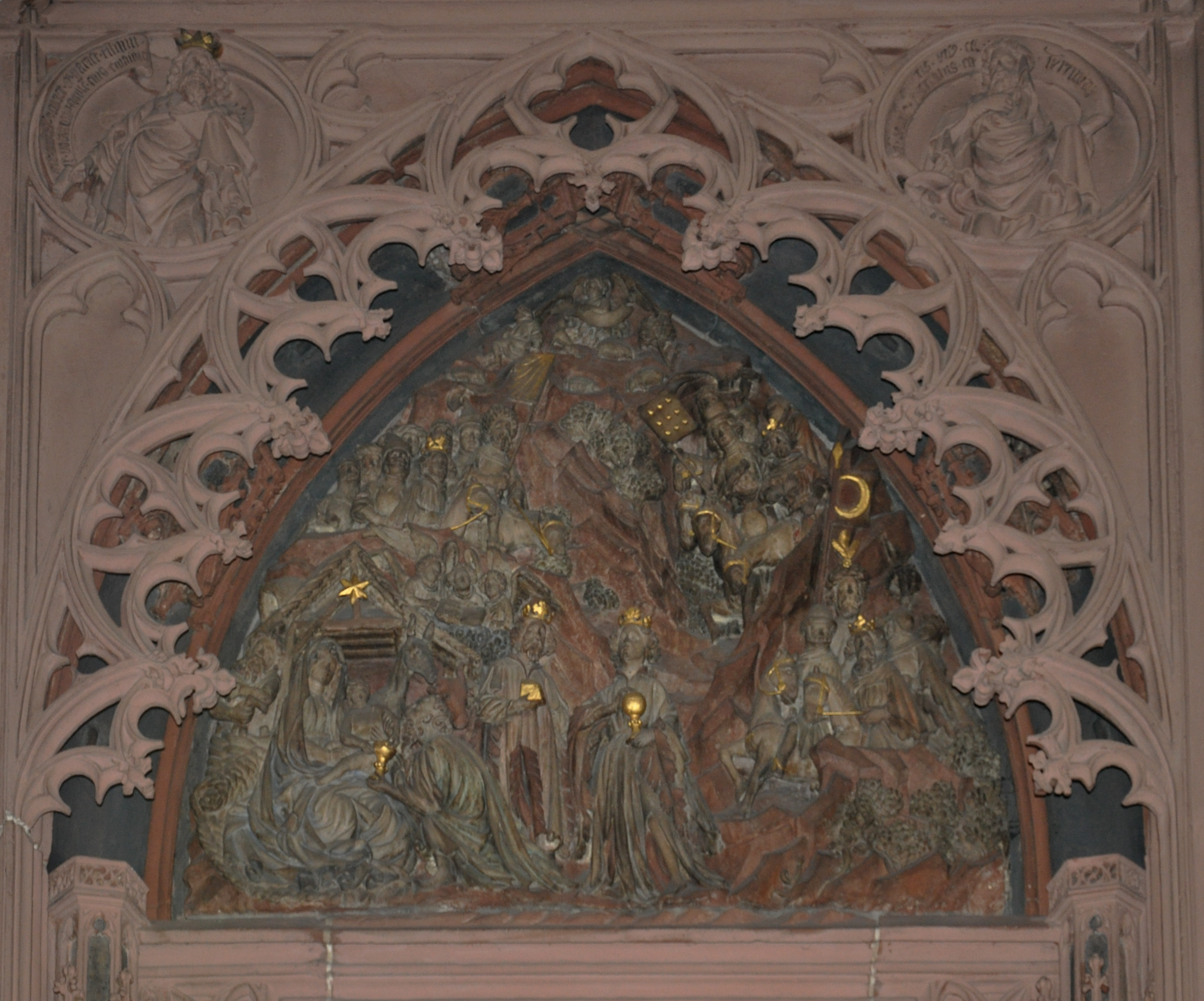 Frankfurt am Main, Liebfrauenkirche, ehemaliges Südportal (heute in der Taufkapelle), Dreikönigstympanon (Verkündigung an die Hirten, Ritt der hl. drei Könige, Anbetung der Könige)